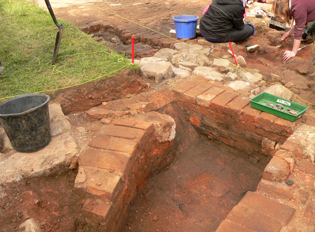 Glashütte Klein Süntel, Ausgrabung von Ziegelmauerwerk